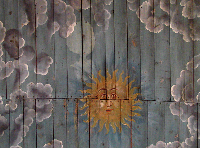 Kristussol i loftet på Solum Kirke, Telemark